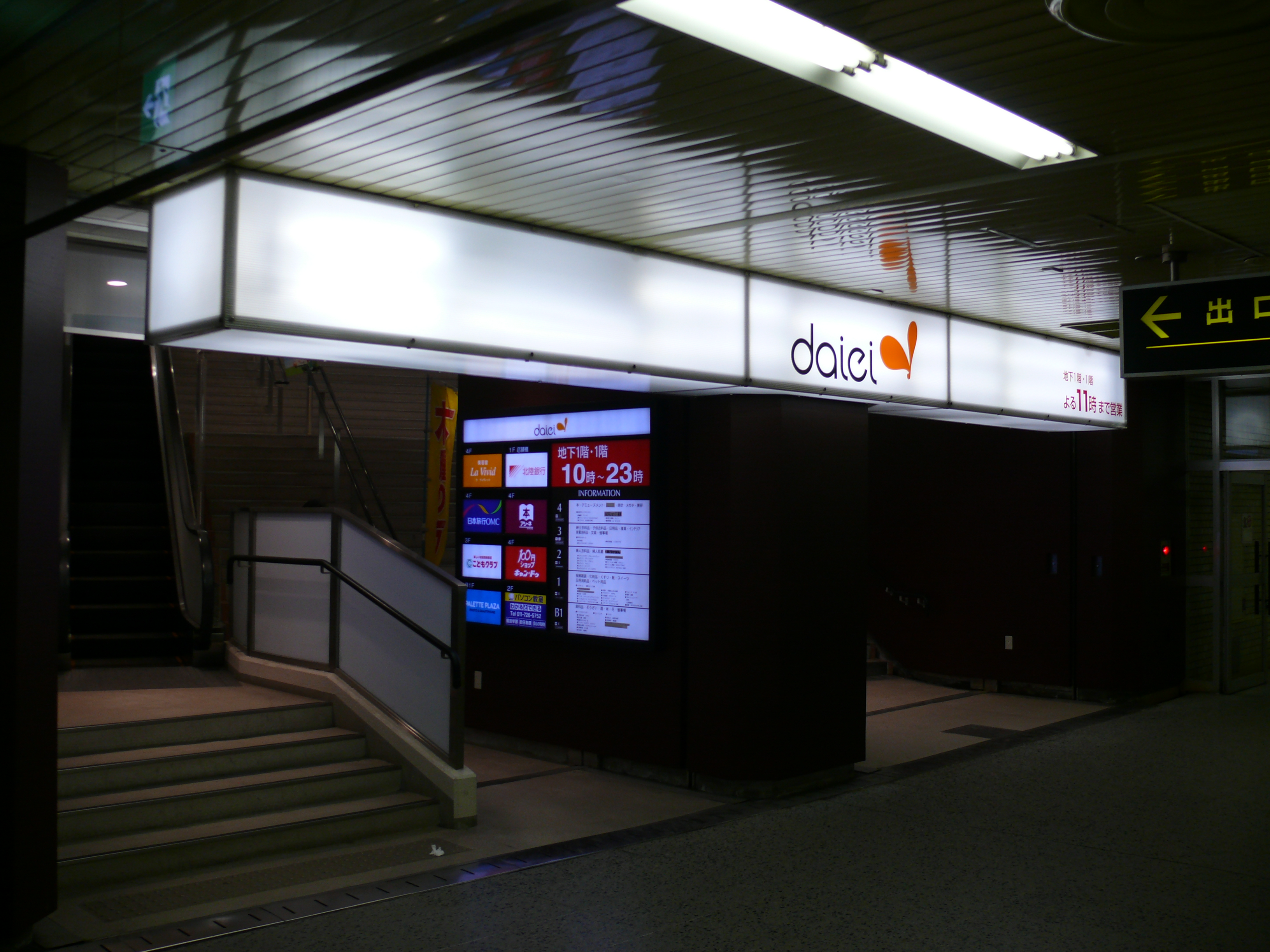 ダイエー麻生店の地下鉄入り口